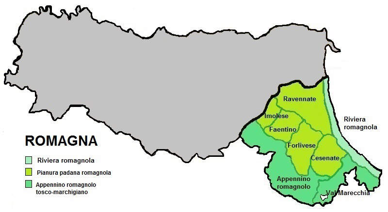 Romagna - cartina territori